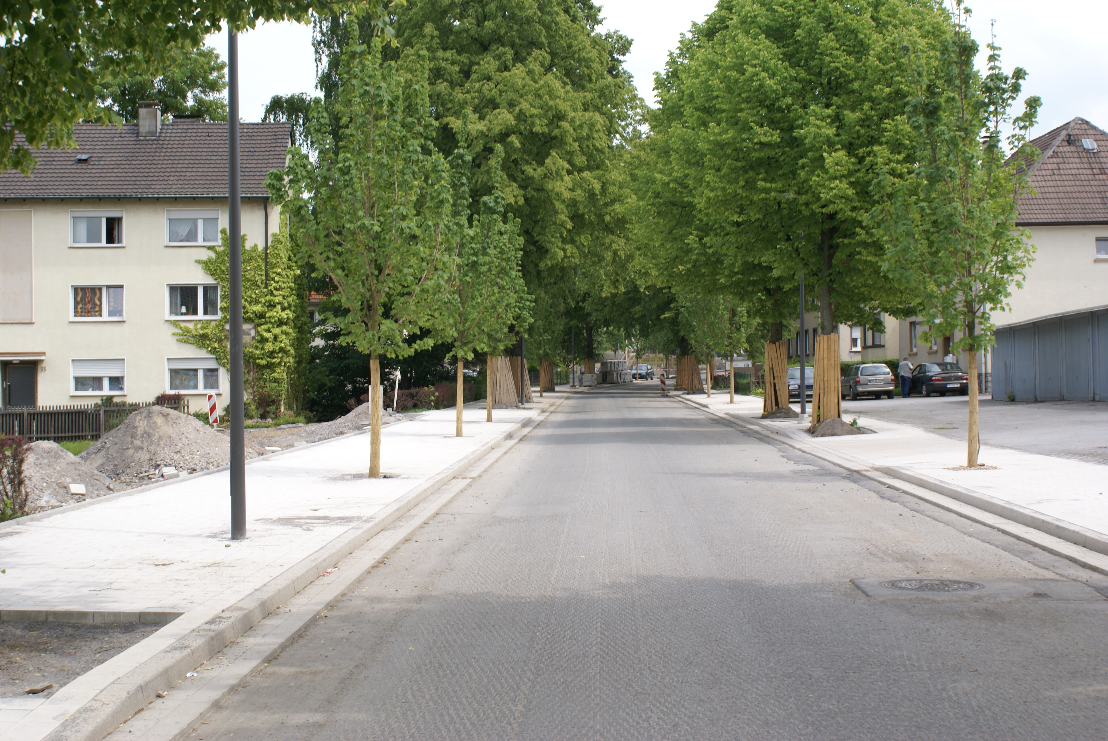 In Bau befindliche Ostenschlahstraße in Hemer, Zufahrt zum Landesgartenschau-Gelände.